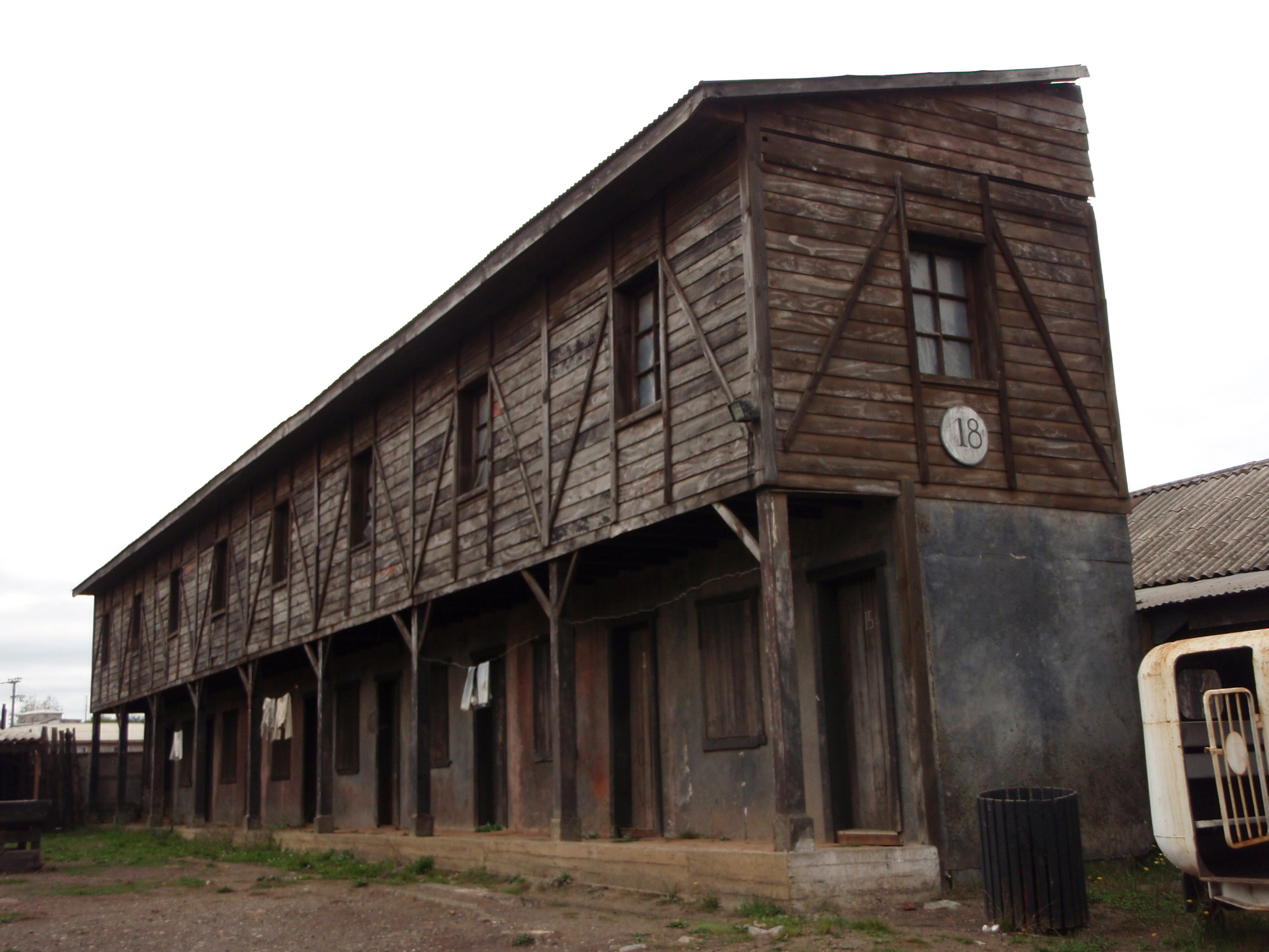 Escenografía de un pabellón de viviendas para mineros, utilizado en la filmación de la película Sub Terra. Se ubica al costado del chiflón. This is a photo of a national monument in Chile: 2129